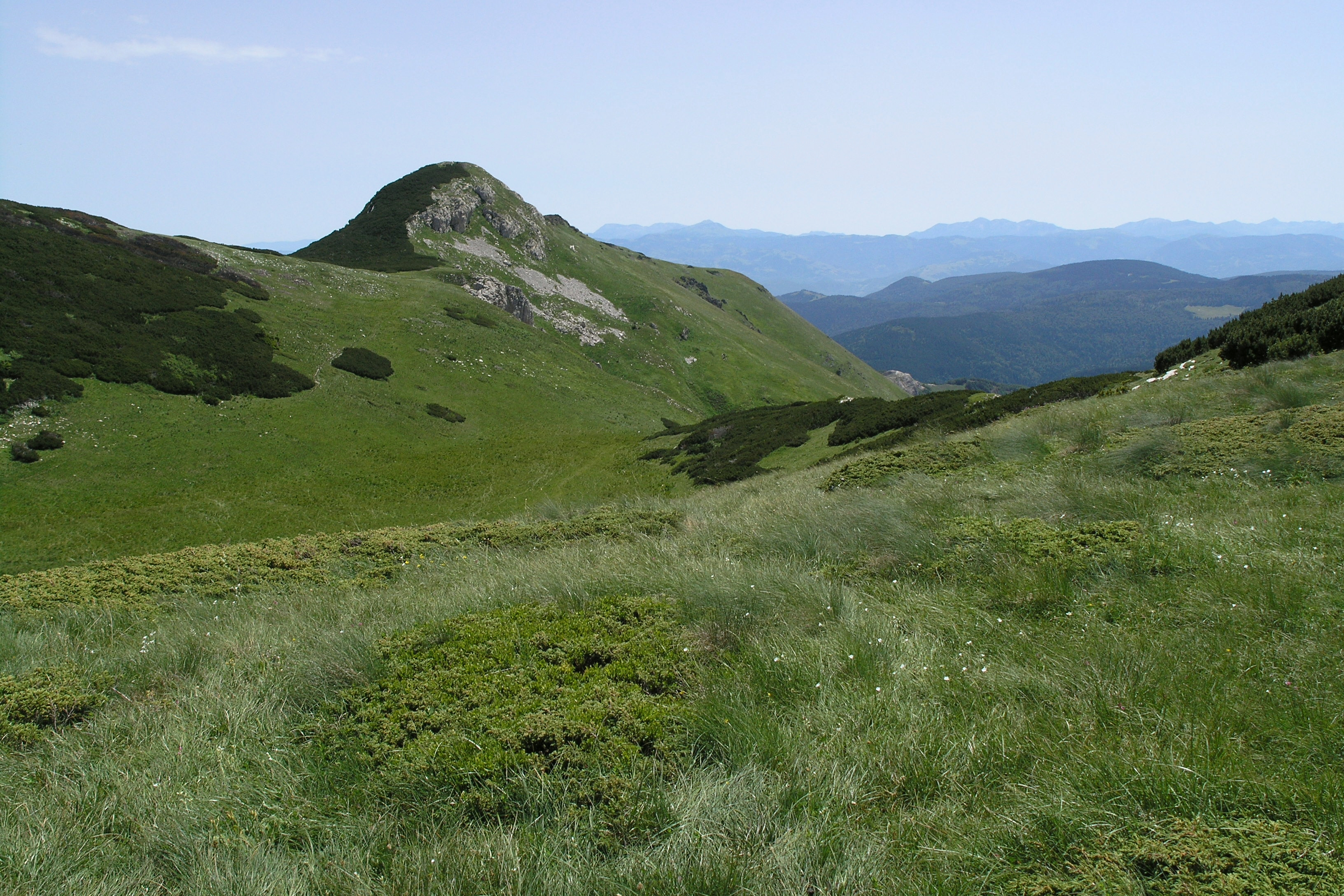 Bjelasica 2008